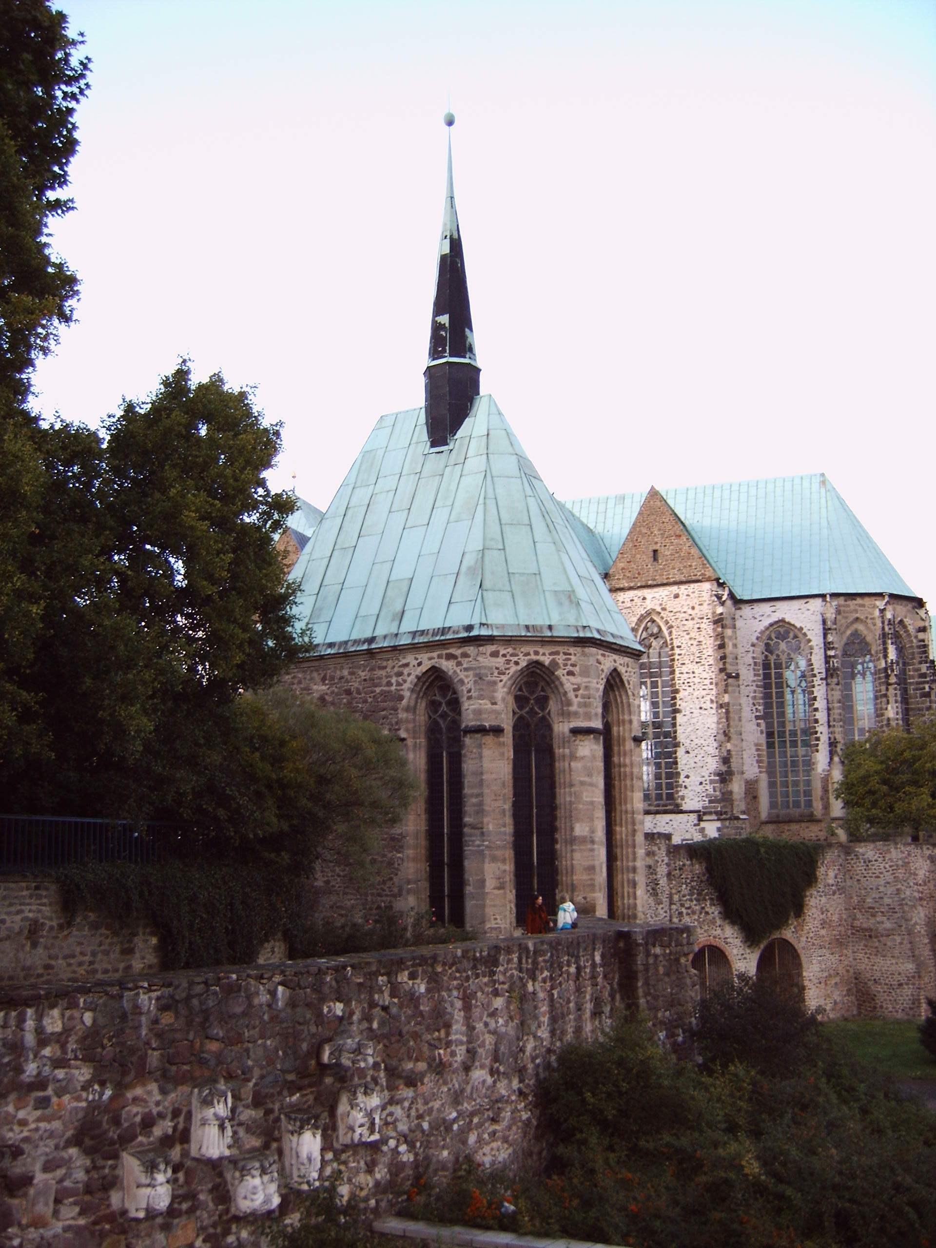 Magdalenenkapelle in Magdeburg, Stadtmauer